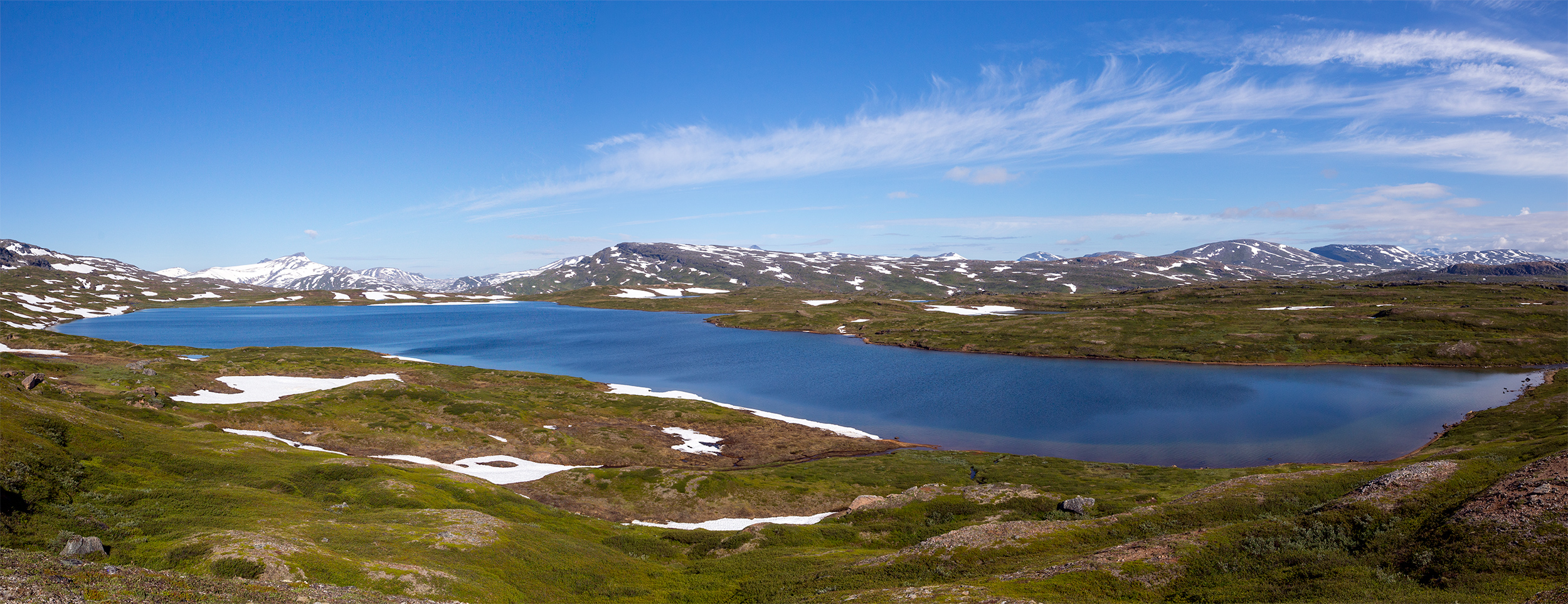 Sjön Gájtsasjjávrre i västra Padjelanta.